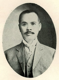 Bân-lâm-gú: Ông Ha̍k-chiâm 王學潛